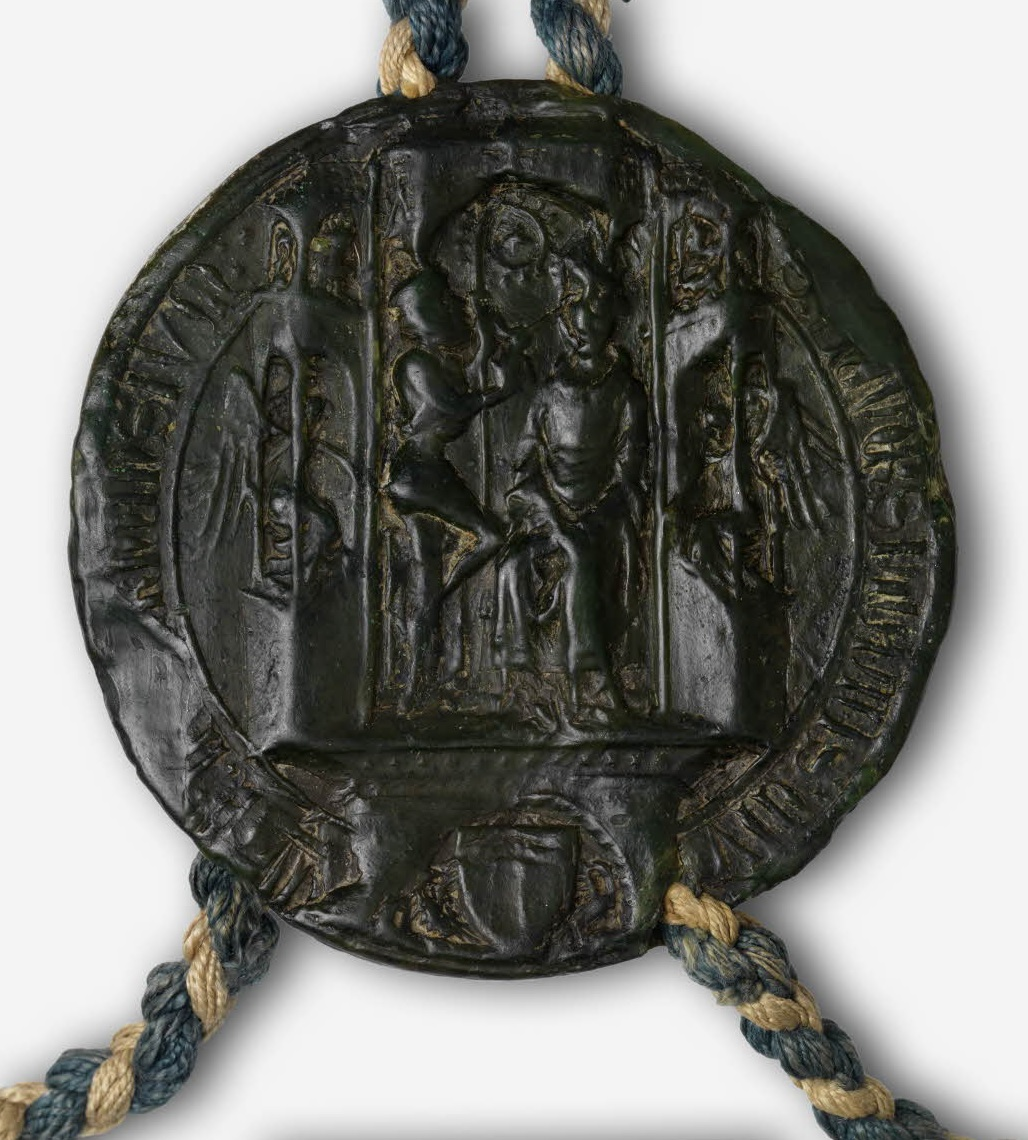 Sceau de Lucerne, appendu au traité de Fribourg